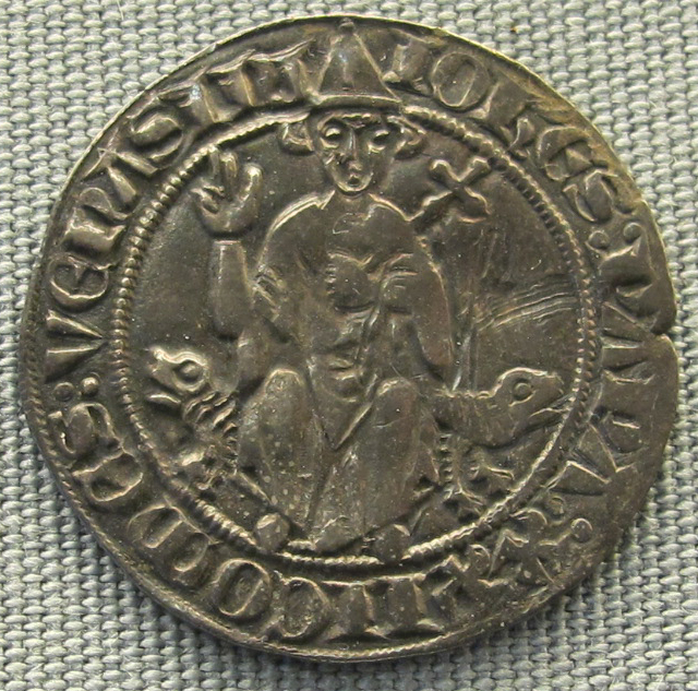 Stato della chiesa, carlino di giovanni XXII, 1316-1334